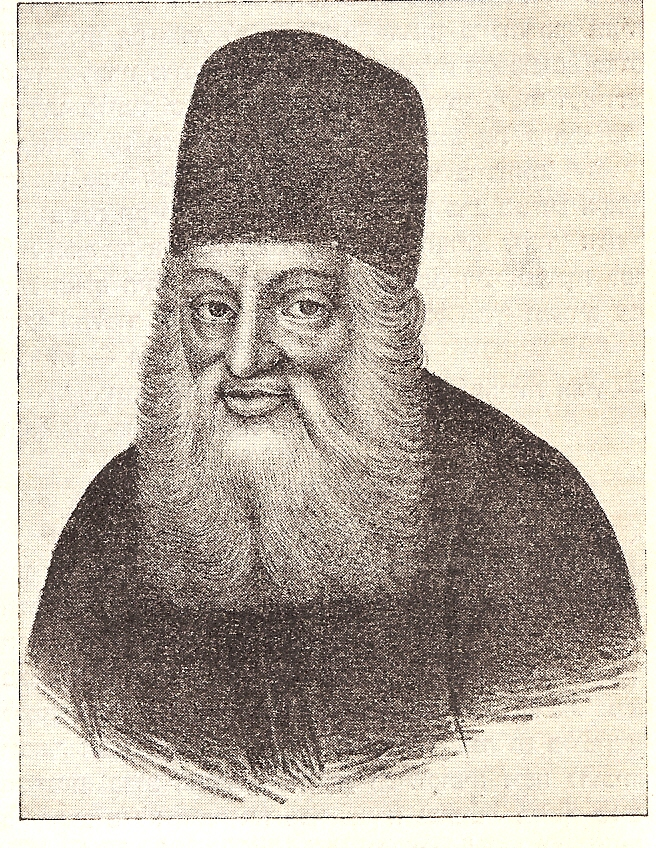 יהונתן אייבשיץ.